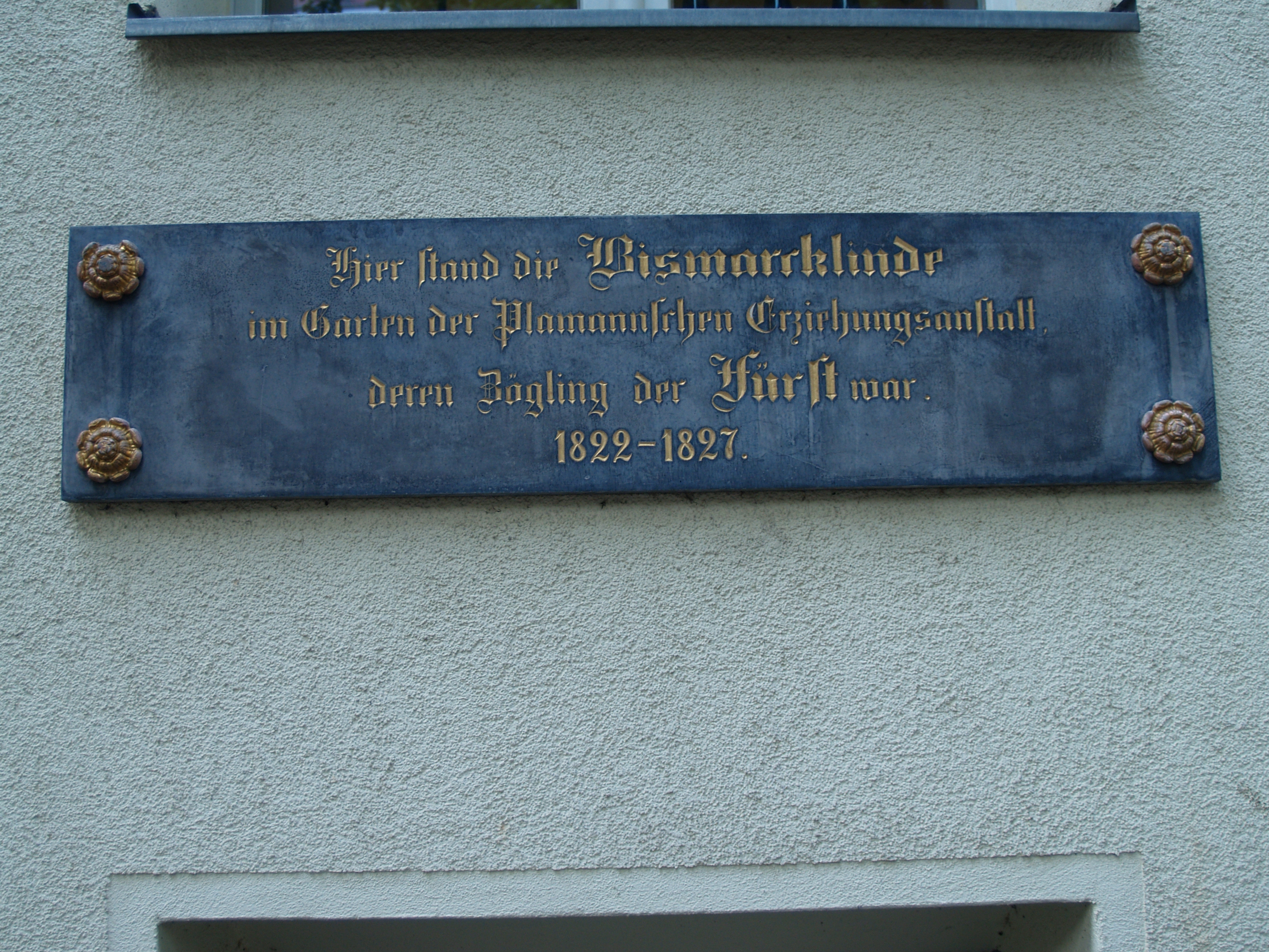 Das Hinweisschild auf die Bismarklinde in der Stresemannstr. 30